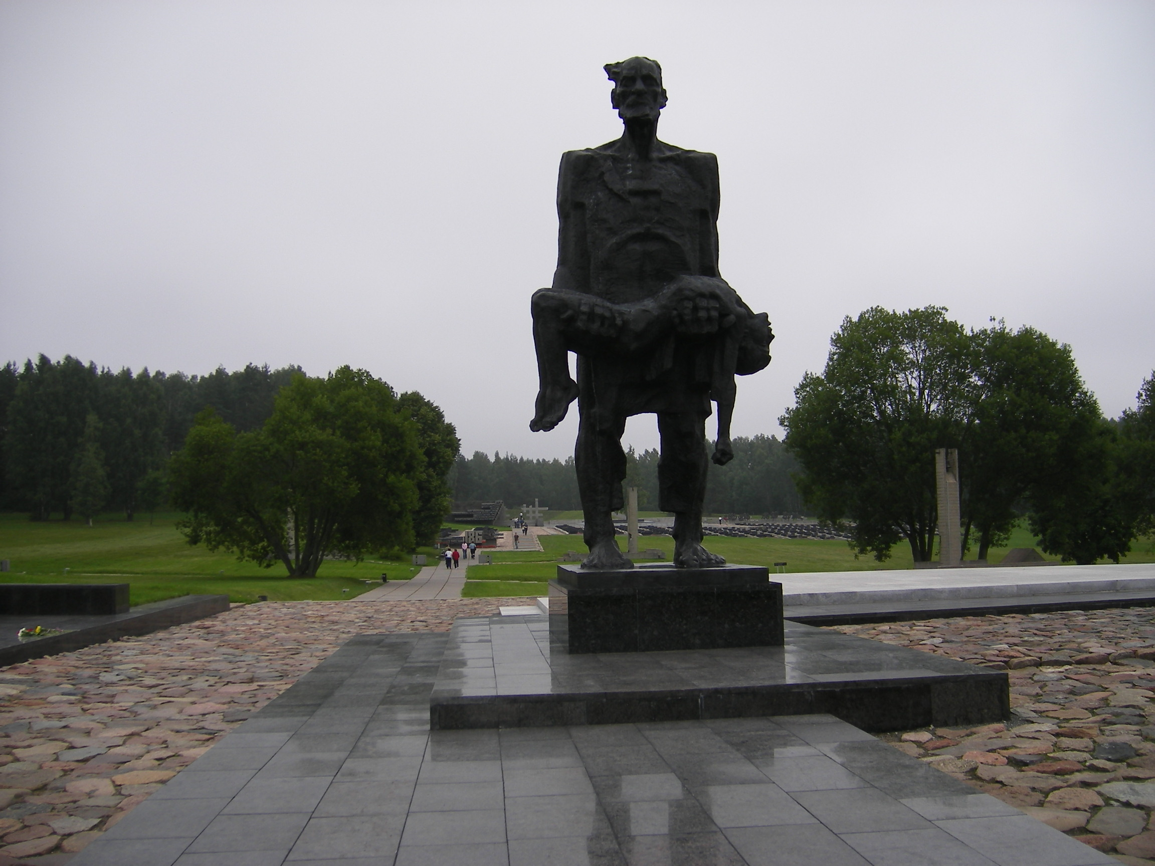 Hatinyi emlékkomplexum, Belarusz